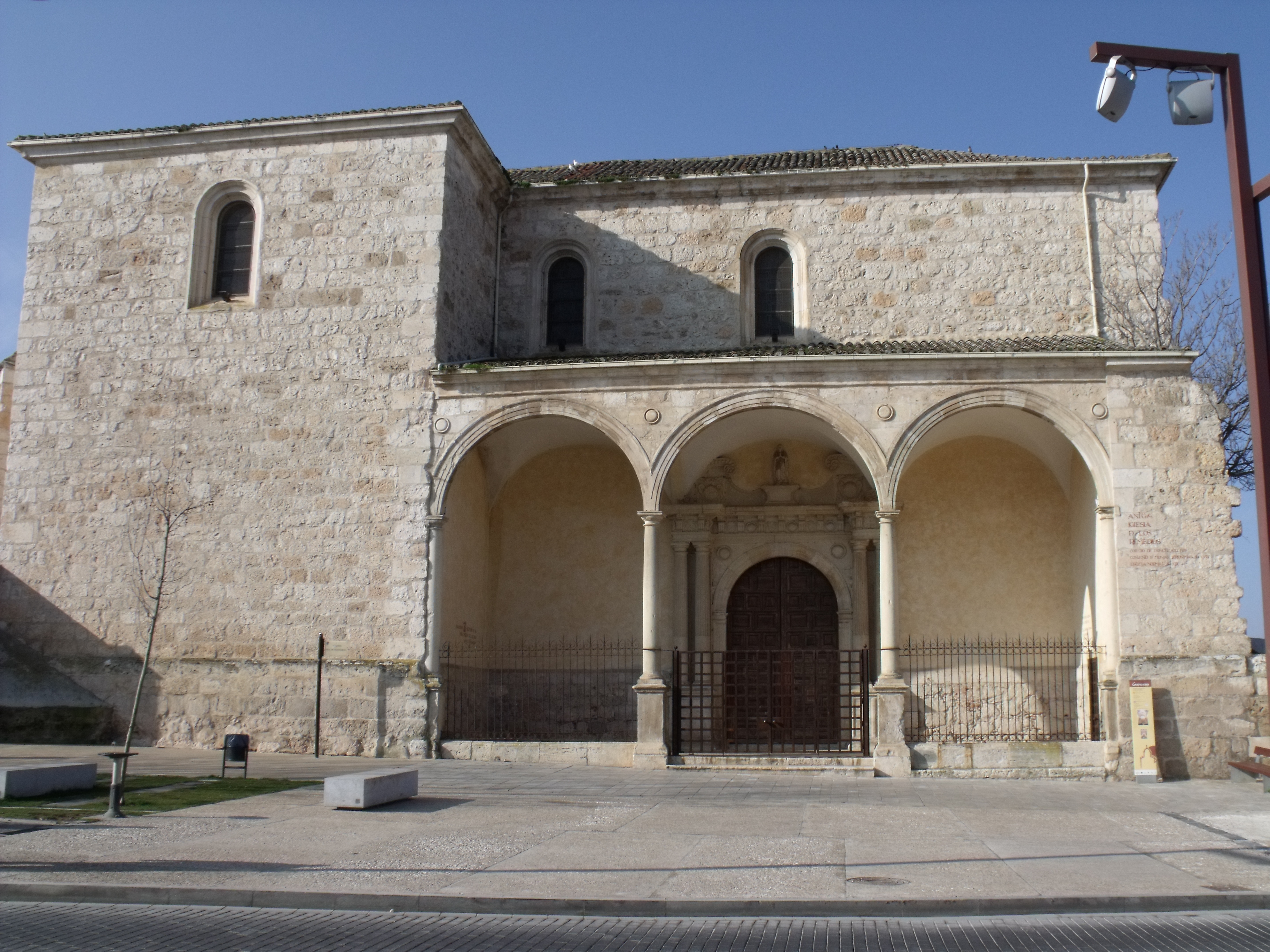 Antigua iglesia de los Remedios, en Guadalajara (España)